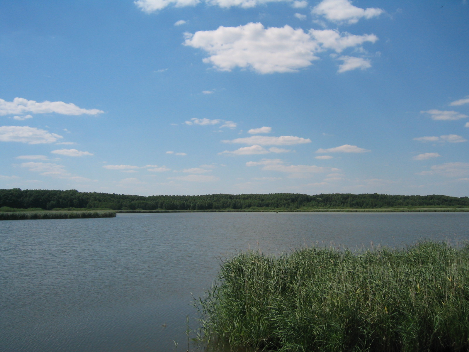 Möllensee zwischen den beiden Uckerseen